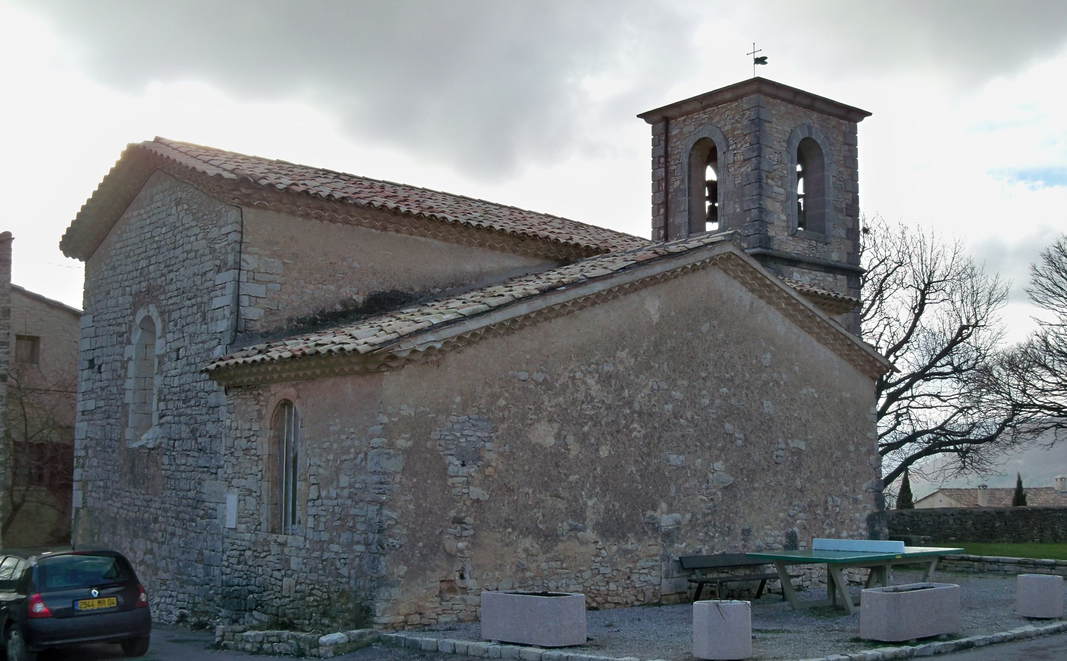 église de l'Hopsitalet (04), France